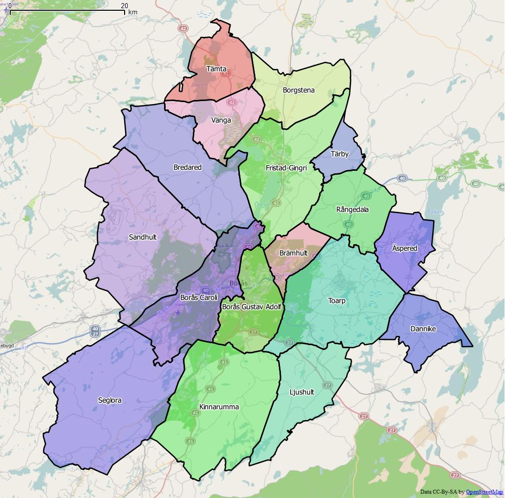 Distriktsindelningen i Borås kommun